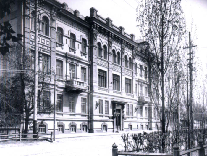 Саратов, здание банка на Константиновской улице, ныне здание суда — улица Советская 44, Саратов.